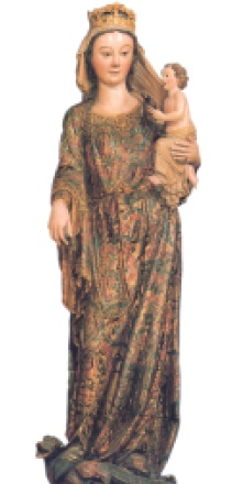 Santa Maria Biasterin